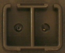 Pildil on testri optiline väljund.